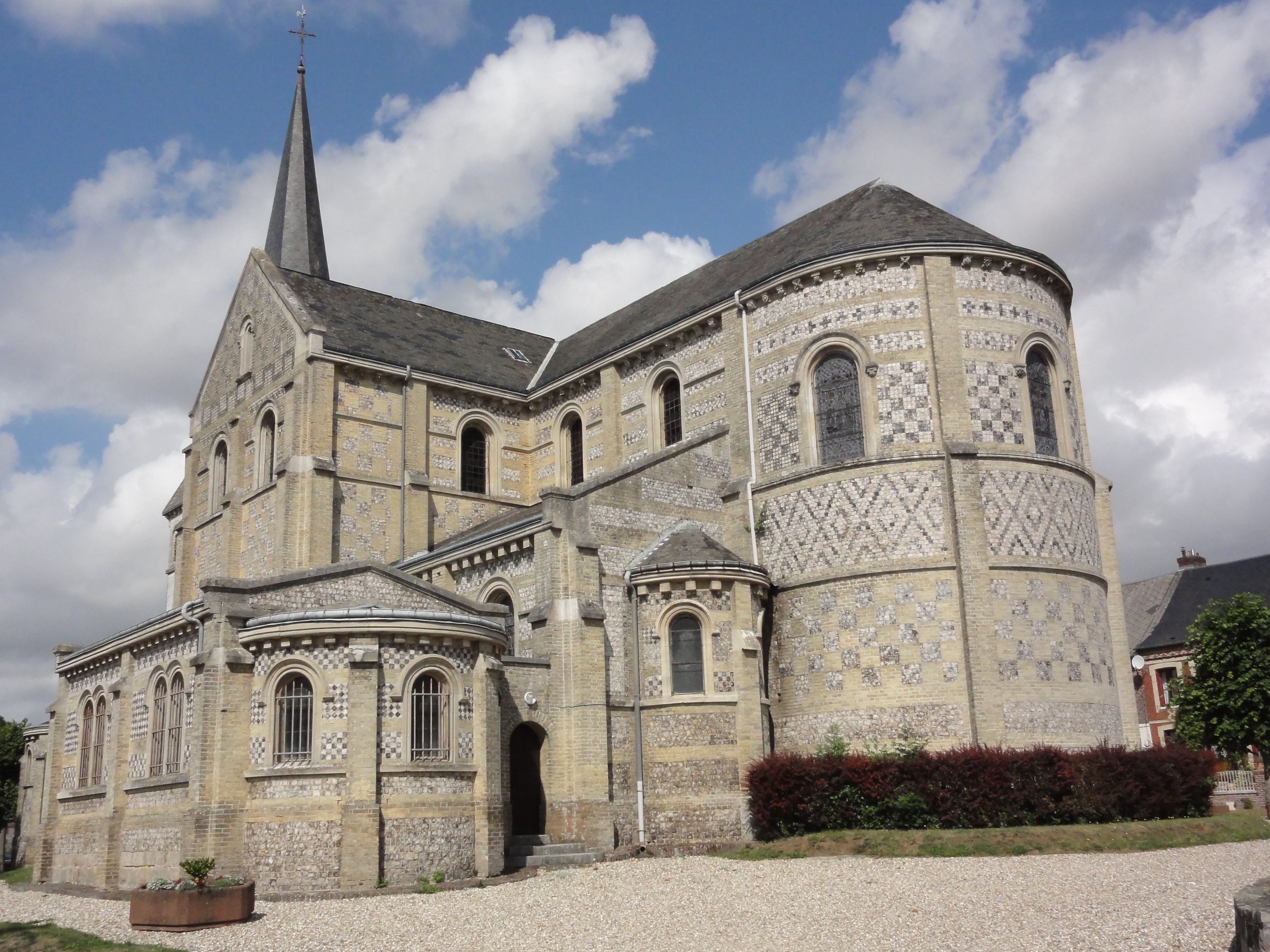 Limésy (Seine-Mar.) église